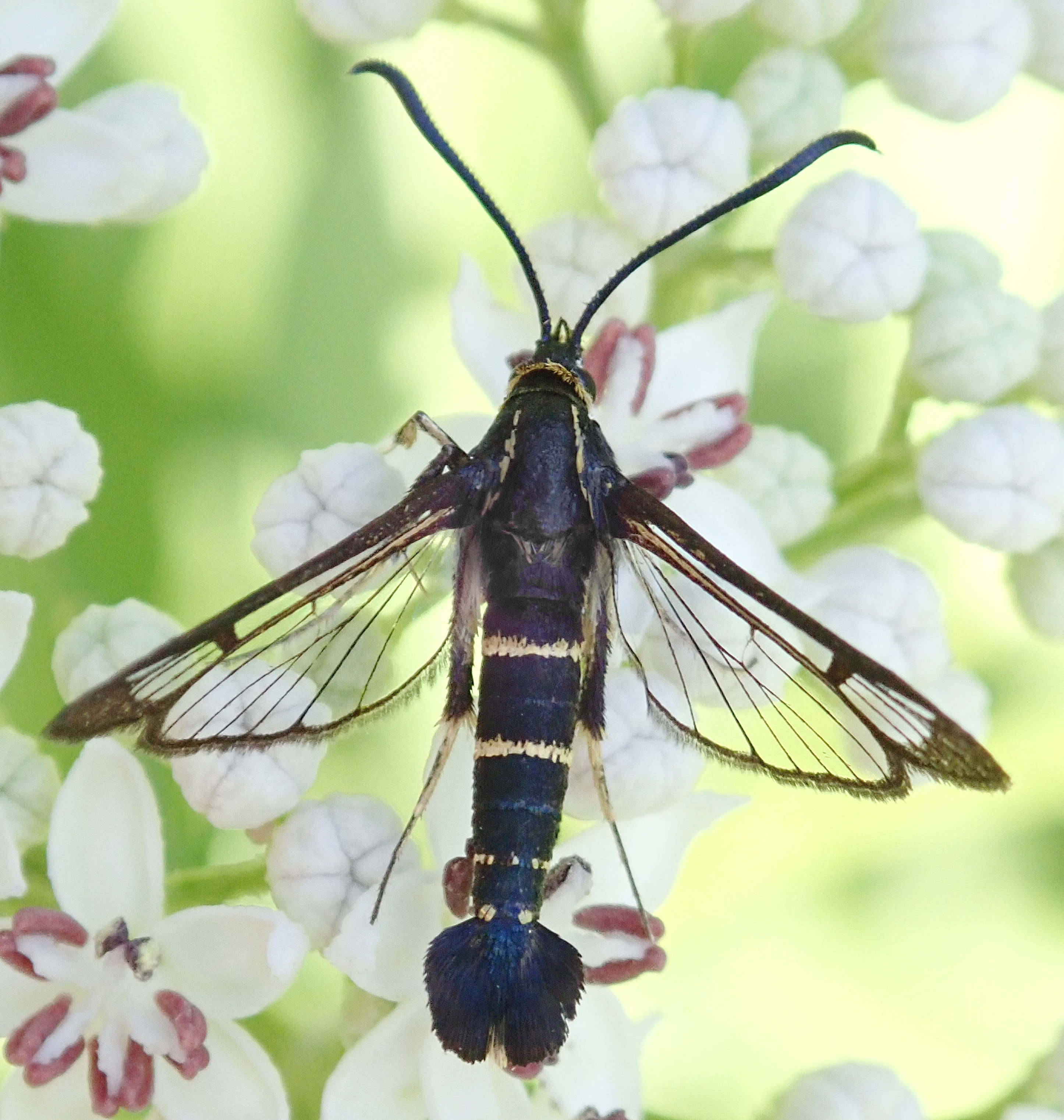 Männchen von Synanthedon loranthi aus Griechenland, Paranassos-Gebirge, bei Eftalofos